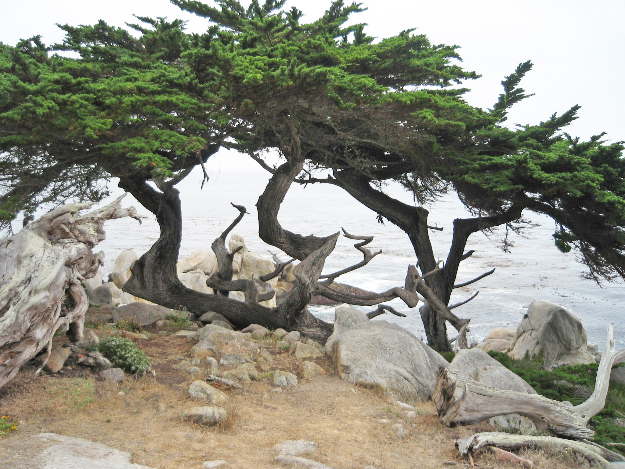 Cupressus macrocarpa, 17-mile Drive, Carmel, California.